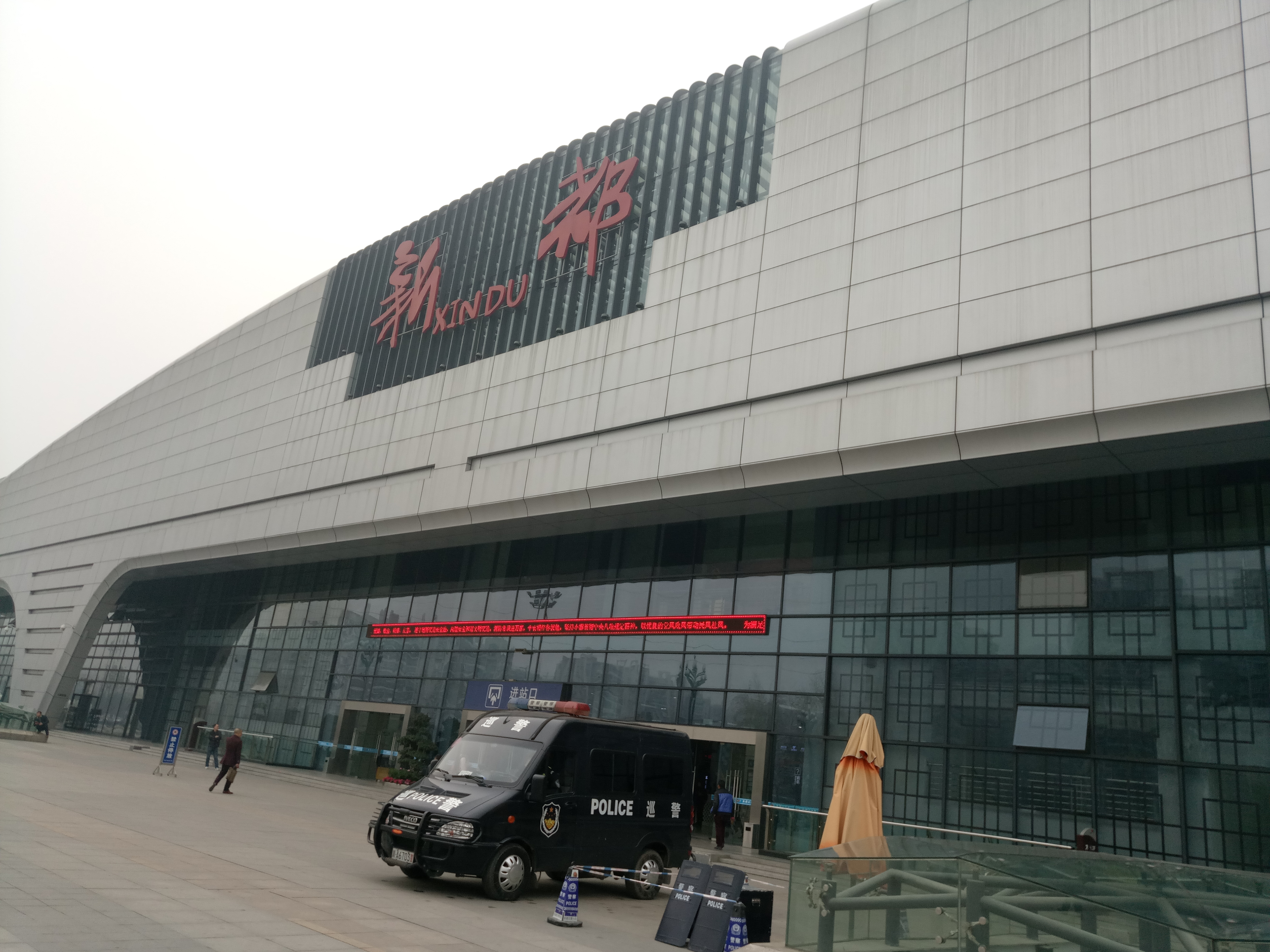 中文（中国大陆）: 新都客运枢纽站